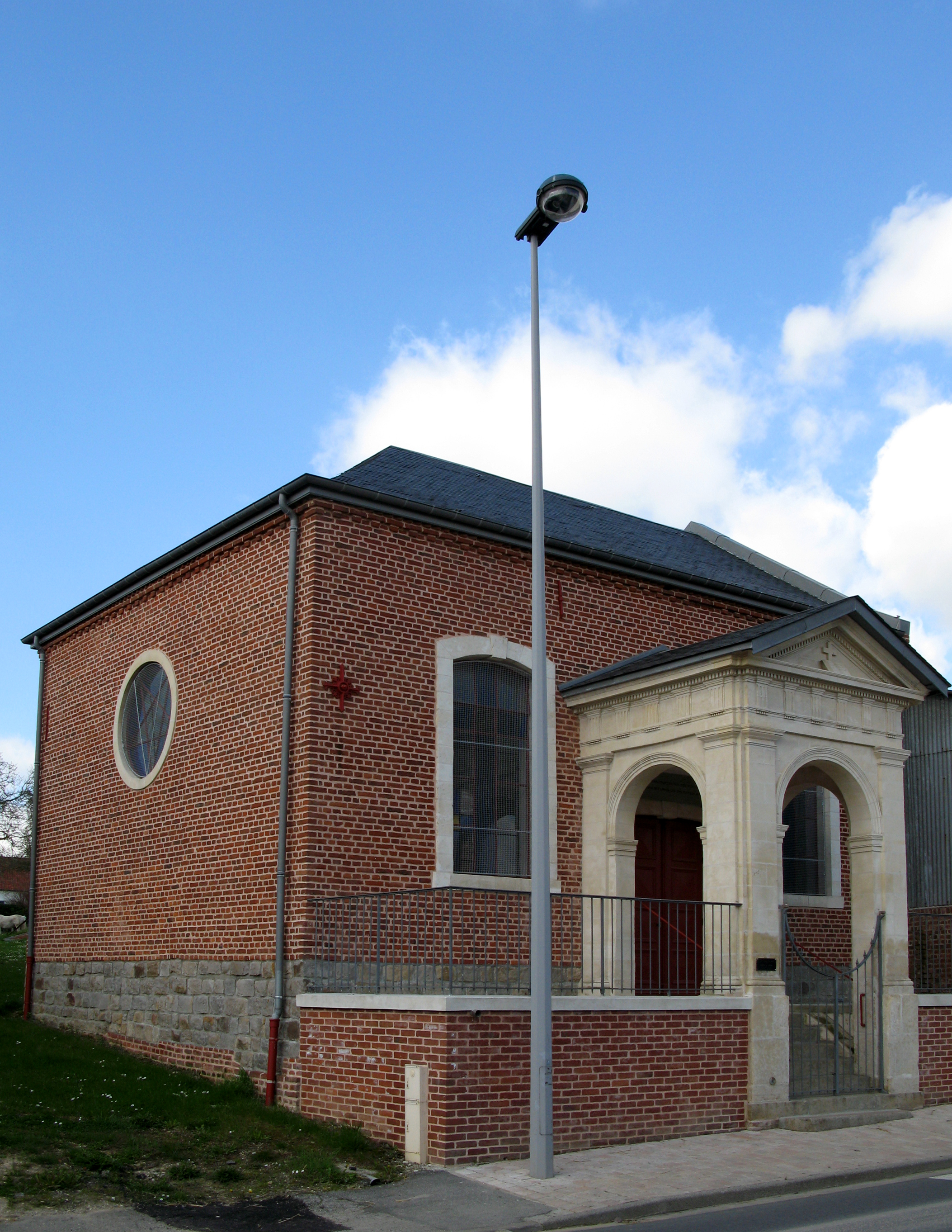 Contay (Somme, France) - Le temple protestant.